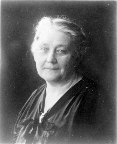 portrait Sabine Hackenschmidt par Lucien Blumer